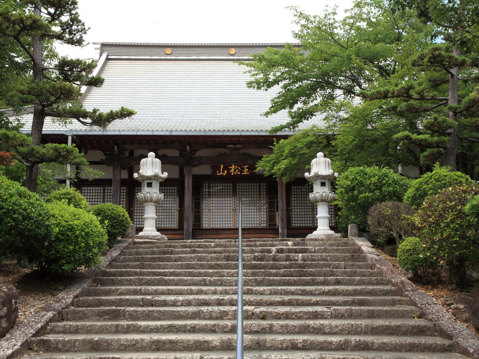 玉松山祐福寺本堂（愛知郡東郷町、2012年）